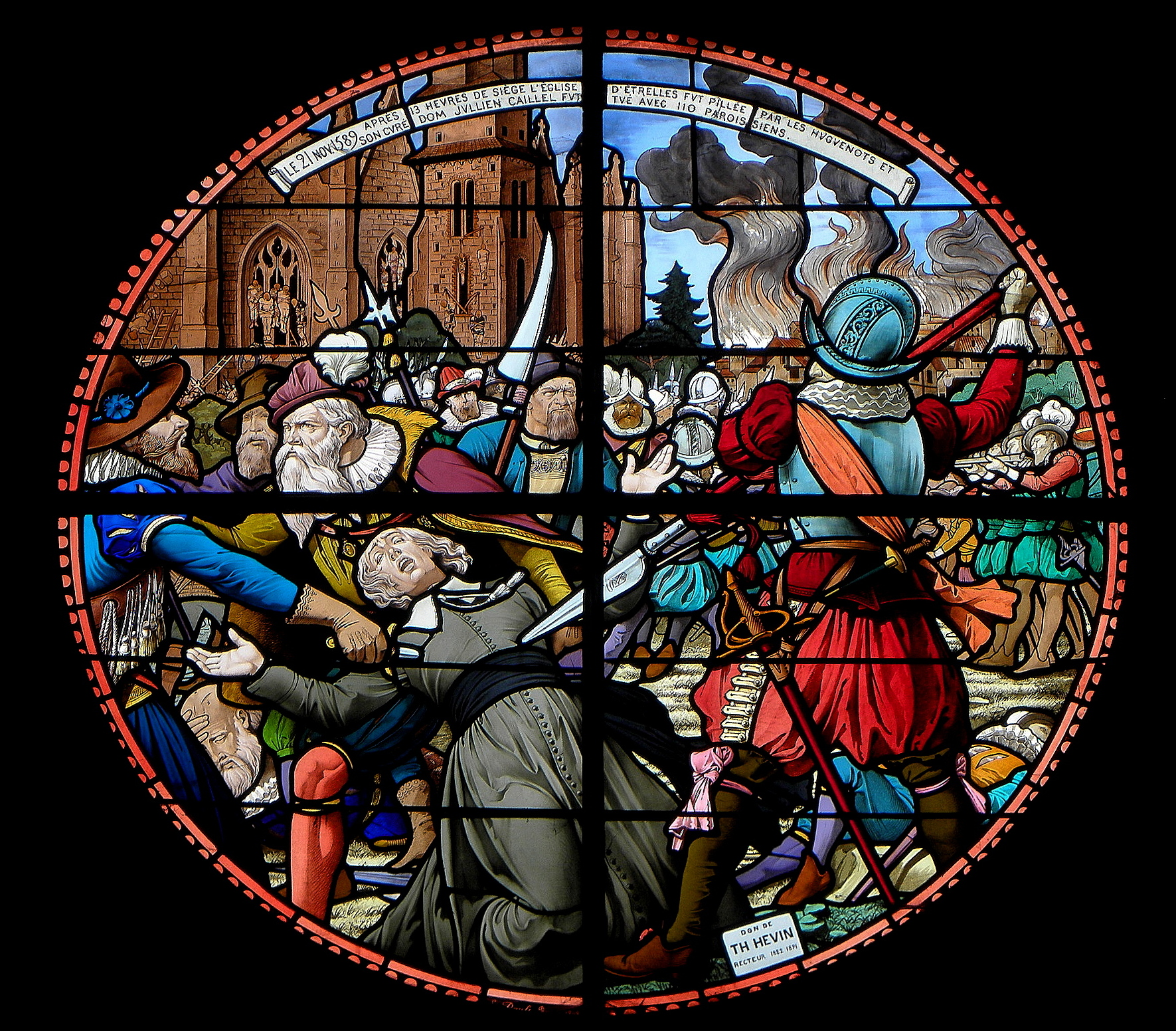 Vitrail de l'église Saint-Pierre-et-Saint-Paul d'Étrelles (35).